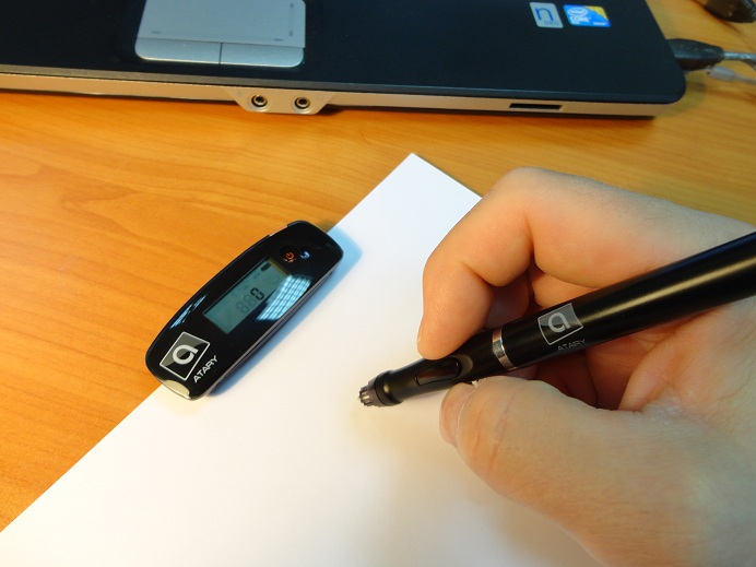 Цифровая ручка - это прежде всего ручка, которая пишет чернилами (пастой) по обычной бумаге